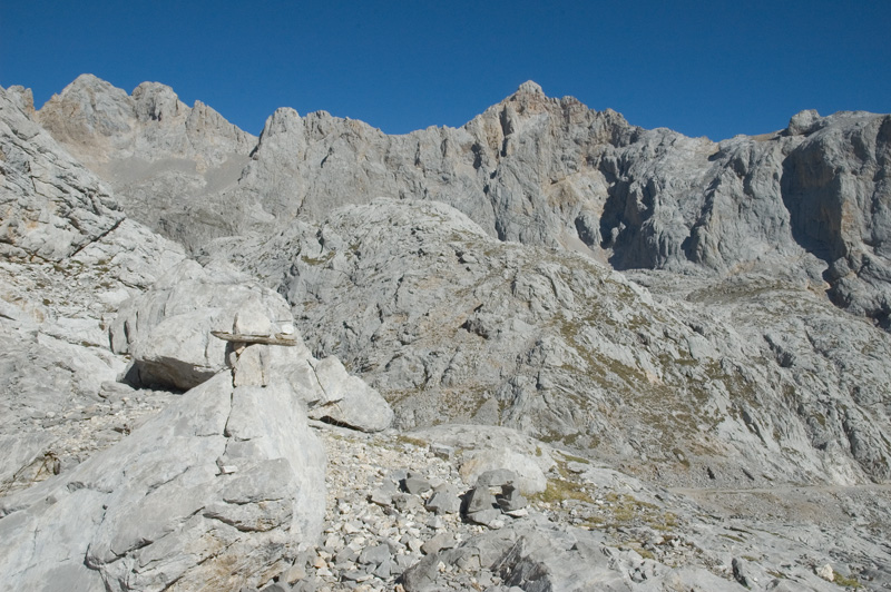 Minas de Altaiz. Situadas en los Picos de Europa, comunidad autónoma de Cantabria. 2100 metros de altitud. Octubre de 2006.